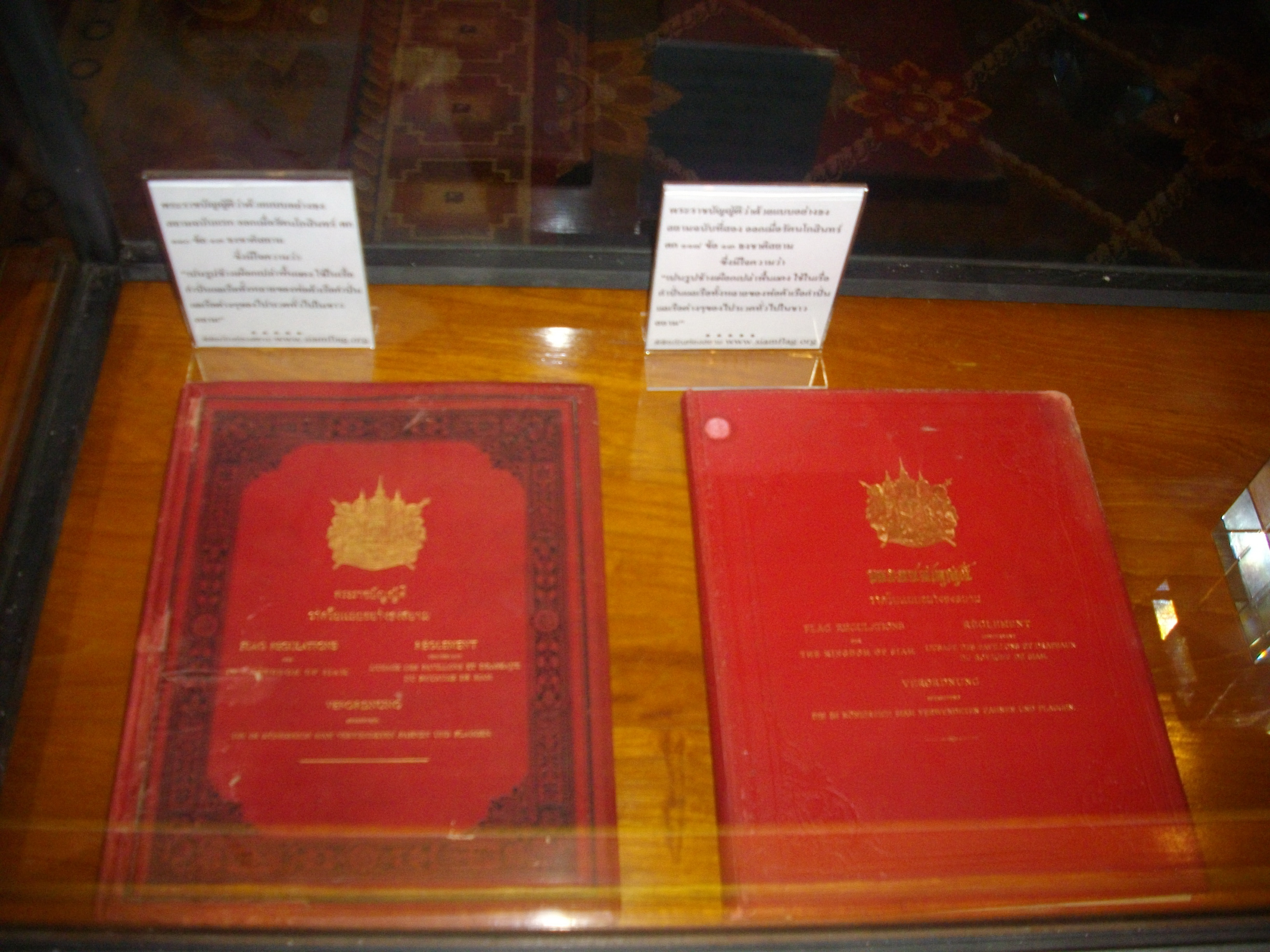 พระราชบัญญัติเกี่ยวกับธงสมัยแรกๆ ของ ไทย 2 ฉบับ ได้แก่ พระราชบัญญัติว่าด้วยแบบอย่างธงสยาม รัตนโกสินทรศก 110 ตราเมื่อวันที่ 25 มีนาคม ร.ศ. 110 (ซ้าย) และพระราชบัญญัติธงรัตนโกสินทรศก 118 ตราเมื่อวันที่ 1 ธันวาคม ร.ศ. 118 (ขวา) พระราชบัญญัติทั้งสองเล่มนี้ได้จัดพิมพ์ที่เมืองไลป์ซิก ประเทศเยอรมนี จัดแสดงในงานนิทรรศการธงสำคัญของชาติ เมื่อวันที่ 18 กุมภาพันธ์ พ.ศ. 2553